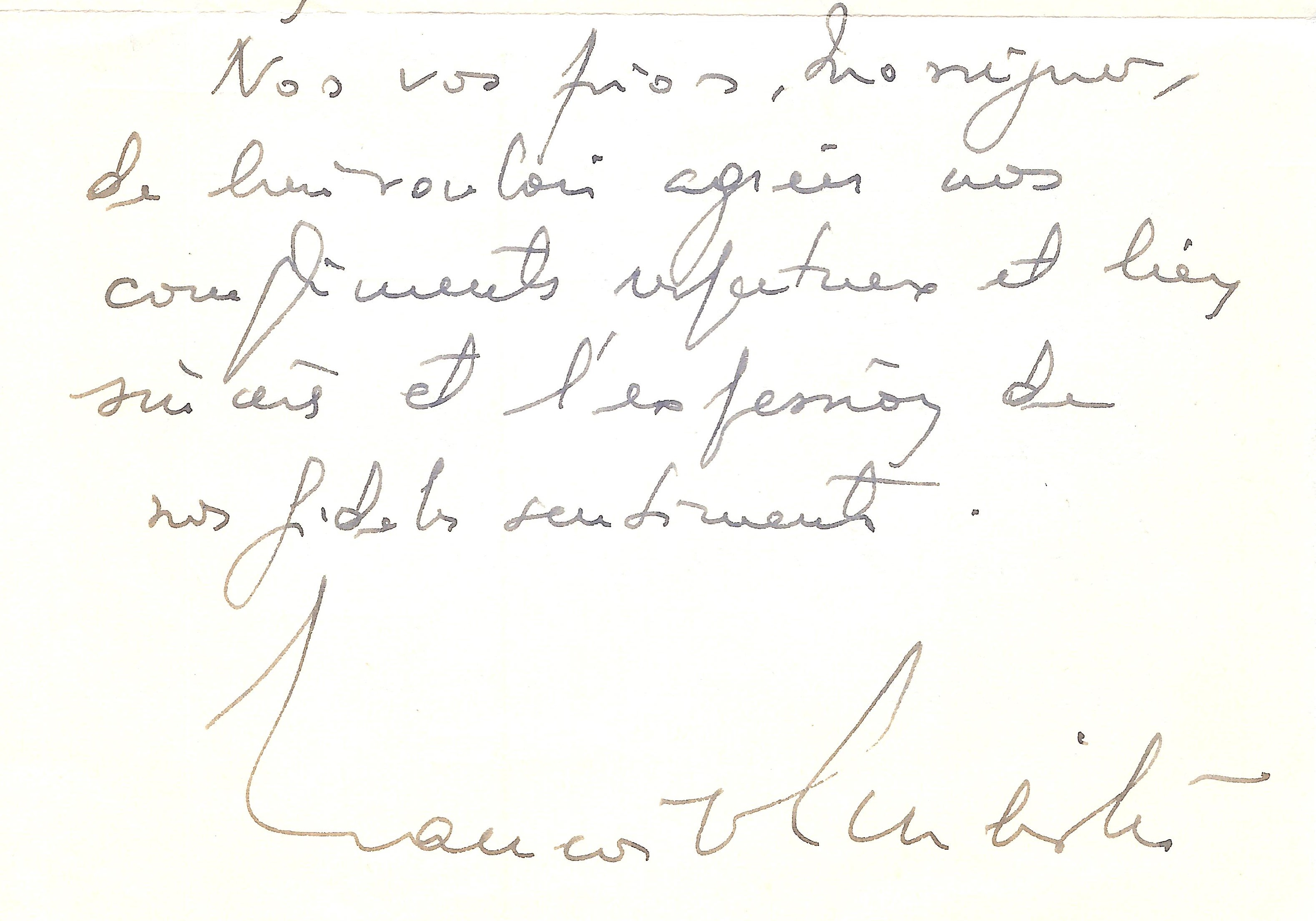 Ecriture et autographe extraits d’une lettre de François Schleiter (1911–1990), sénateur de la Meuse et Vice-Président du Sénat. Cette lettre du 12 septembre 1954 fut adressée à Monseigneur Charles Aimond à la suite de sa nomination à l’ordre de la Légion d’Honneur. Source : Archives Jean Grosdidier de Matons (1926–2017), sans doute par sa nièce et gouvernante Jeanne Buitge qui accompagna Mgr Aimond au cours de sa vie.